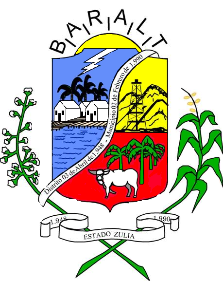 Escudo del municipio Baralt, estado Zulia, Venezuela